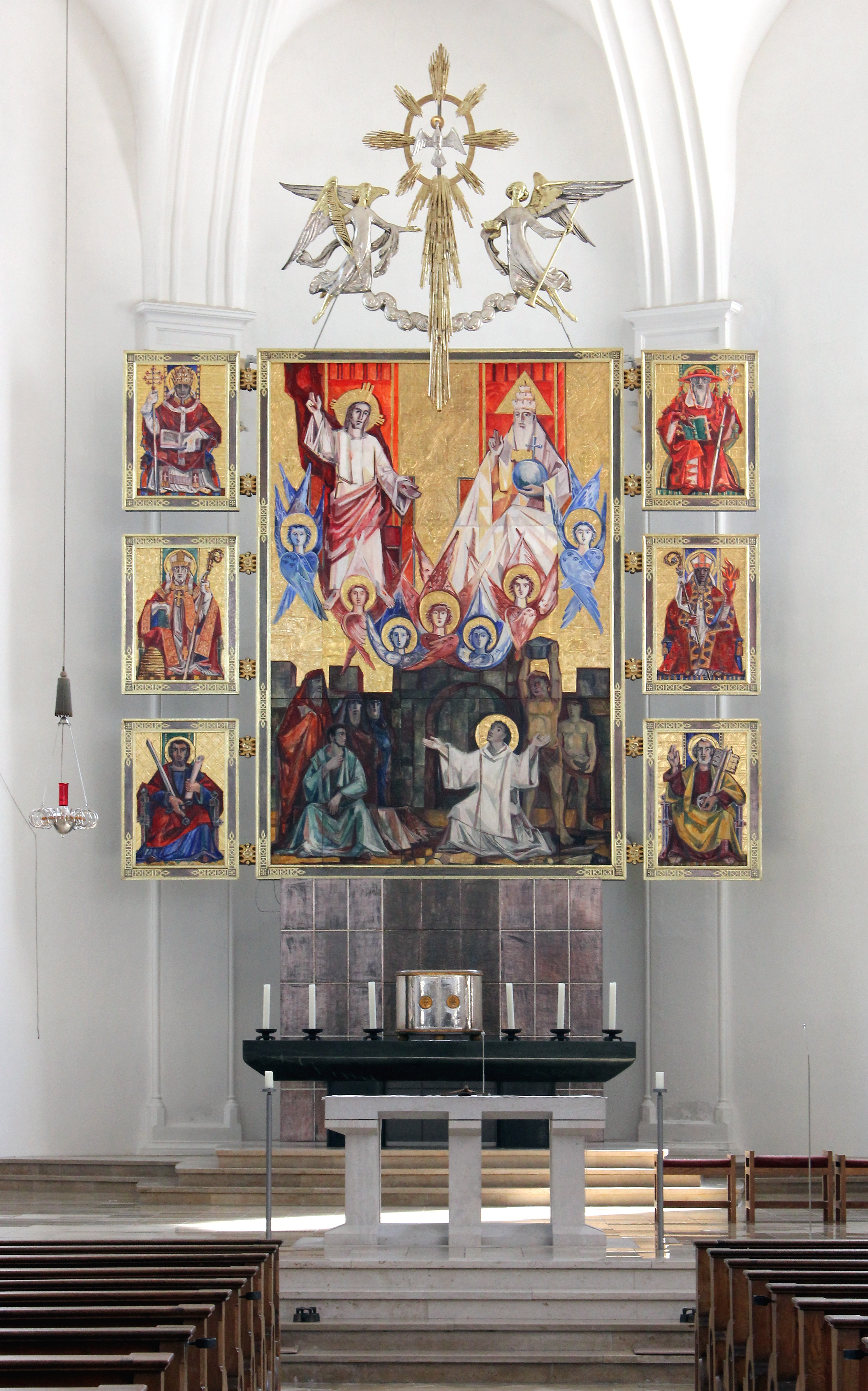 St. Stephan, Mindelheim, Altarbild von Erwin Holzbaur (1927–2010) von 1961/62: in der Mitteltafel die Steinigung des heiligen Stephanus, darüber die Heilige Dreifaltigkeit mit dem Geist in Gestalt der Taube, die über dem Rahmen des Bildes schwebt, links neben diesem Hauptteil von oben nach unten Gregor, Ambrosius und Paulus, rechts Hieronymus, Augustinus und Petrus